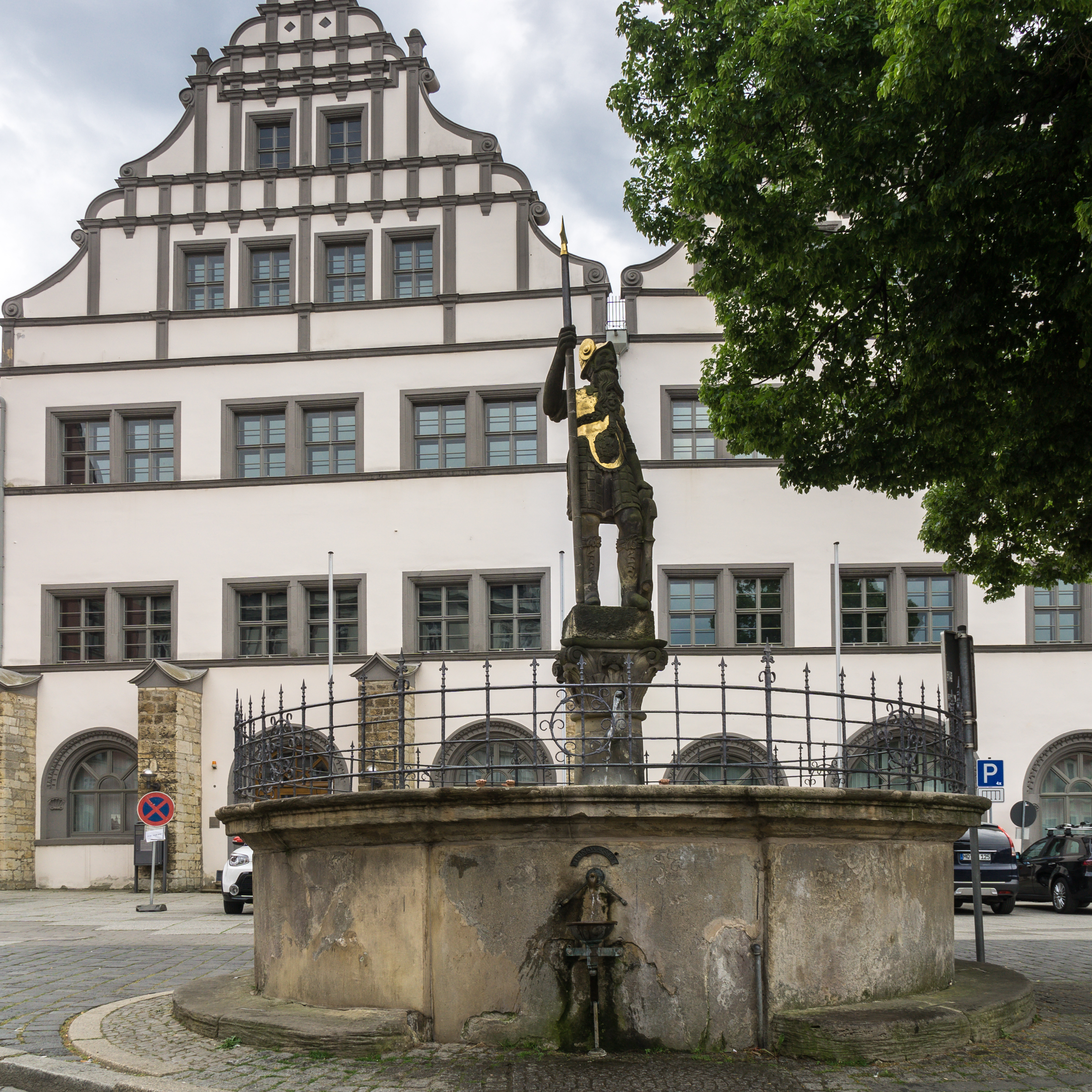 Wenzelsbrunnen auf dem Markt in Naumburg